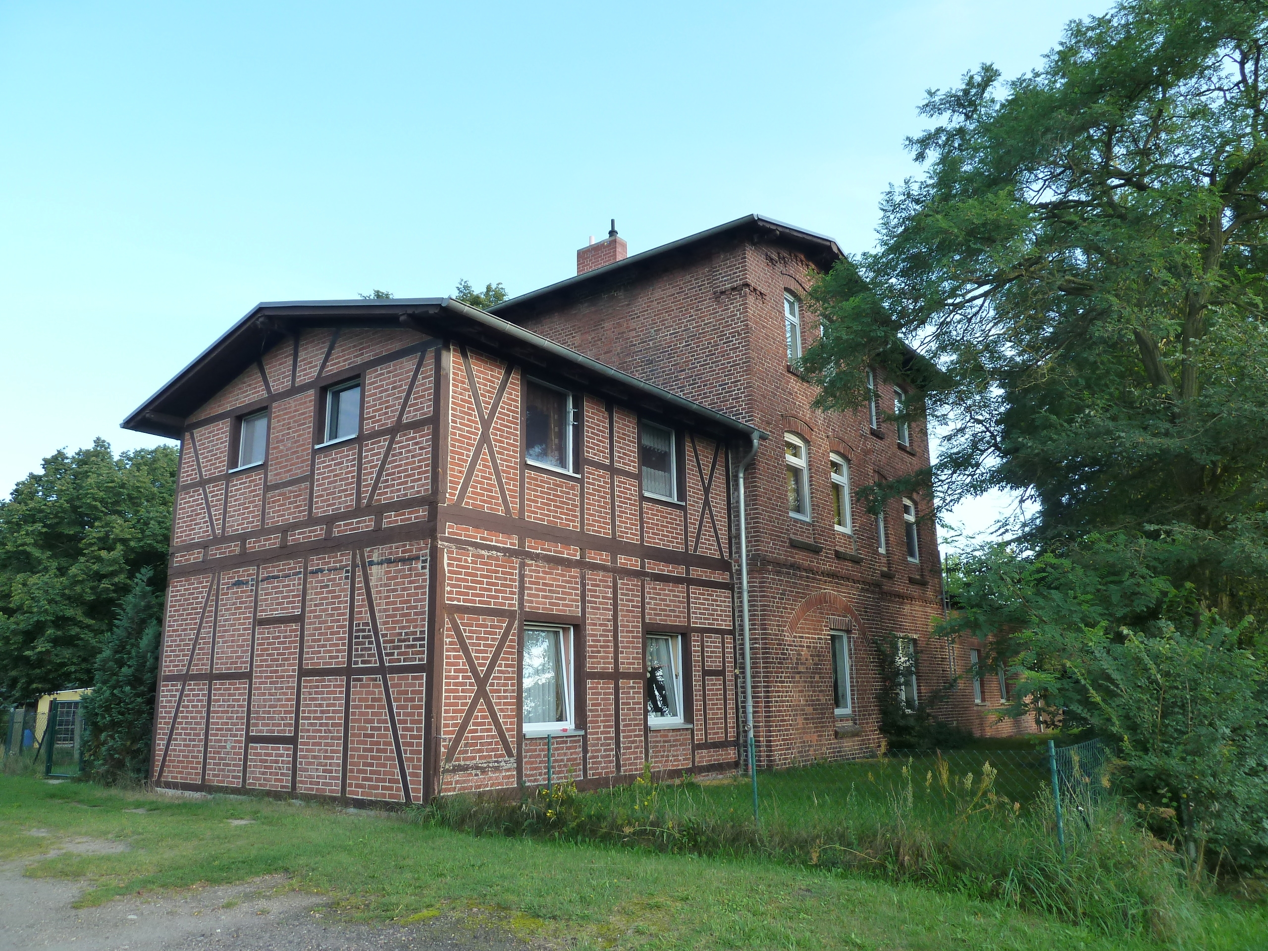 Ehemaliger Bahnhof Milow